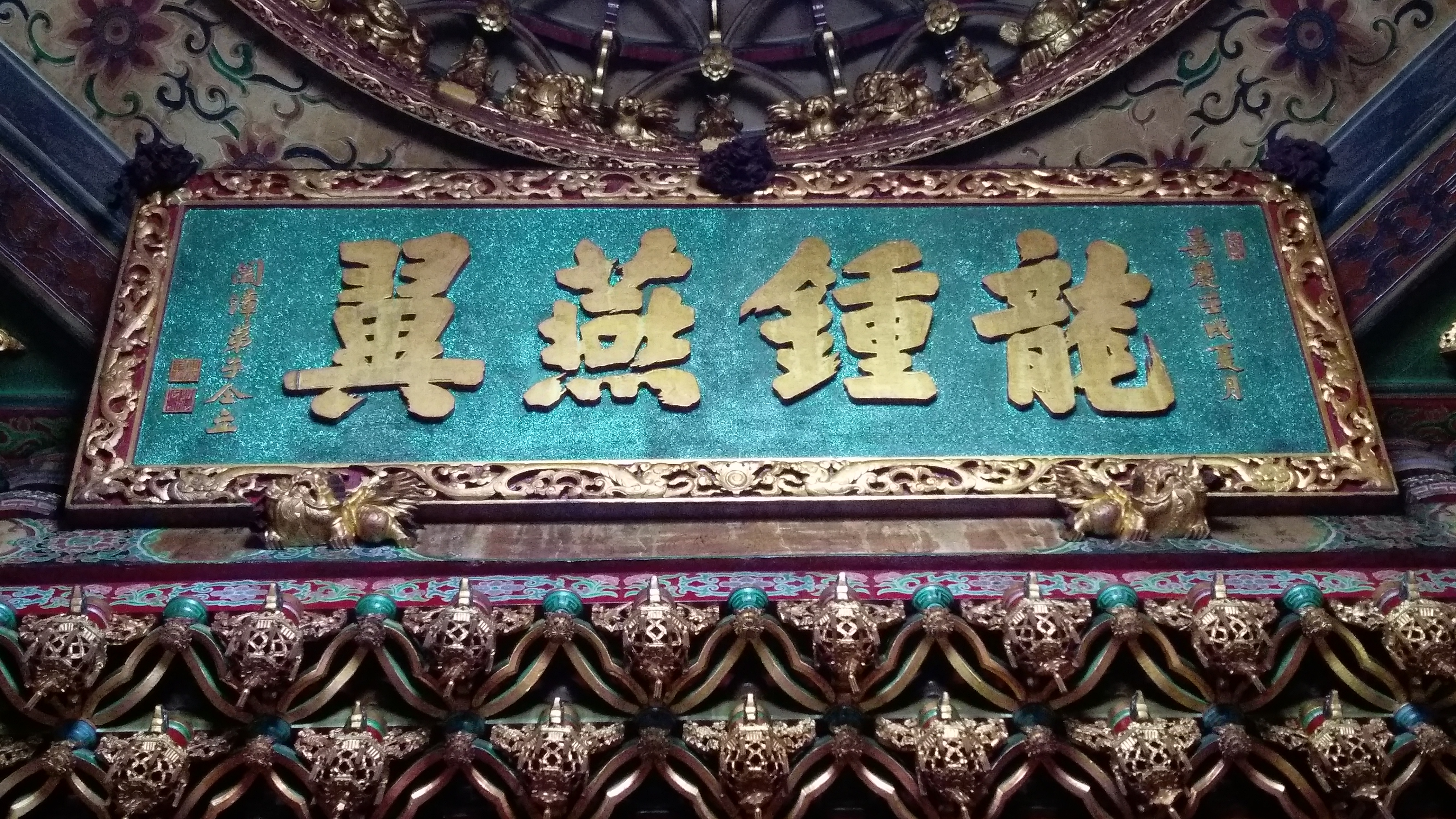 中文（台灣）: 大清嘉慶七年（公元1802年）的匾額「龍鍾燕翼」